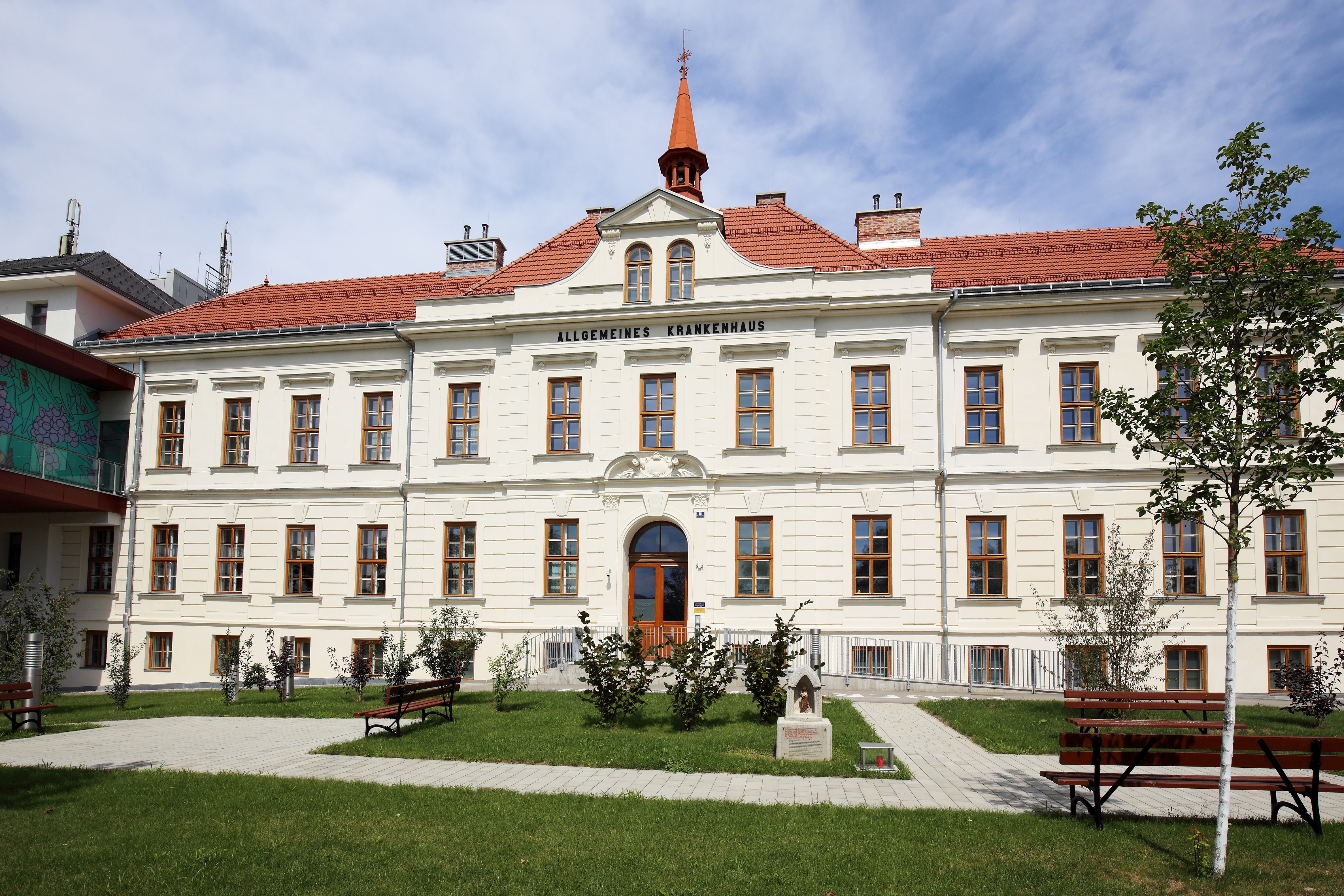 Der Alttrakt des Landesklinikum Mostviertel Melk. Der Alttrakt, ein zweigeschossiger Bau mit Mittelrisalit über einem Kellergeschoss, wurde von 1896 bis 1899 in erhöhter Lage und im Osten der Stadt als Krankenhausneubau für rund 70 Betten errichtet. Die Kapelle Hl. Dreifaltigkeit wurde 1903 nordseitig, mittig angebaut.